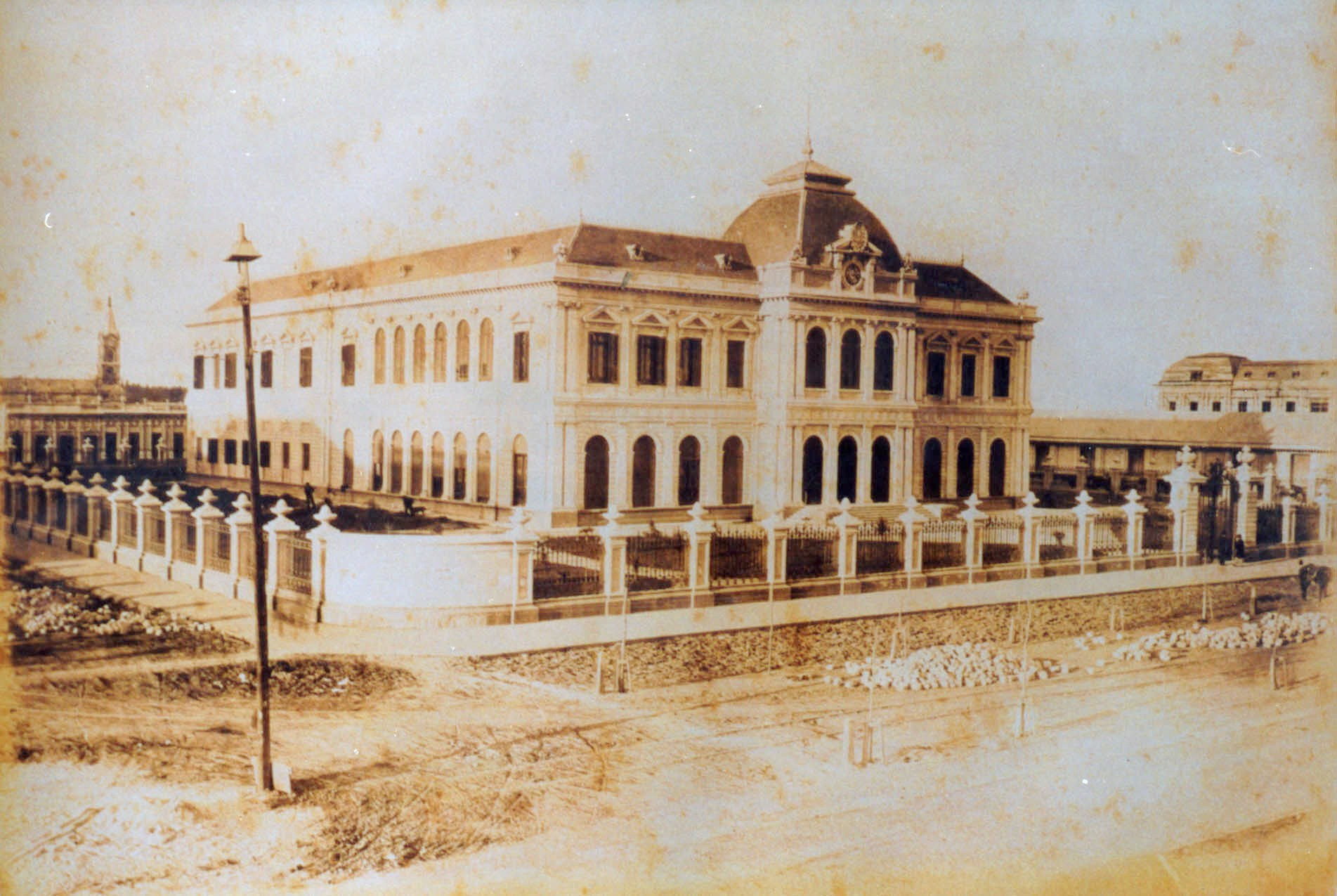 Foto del edificio de la presidencia de la Universidad Nacional de La Plata. En sus primeros años, cuando era sede del Banco Hipotecario de la Provincia de Buenos Aires.